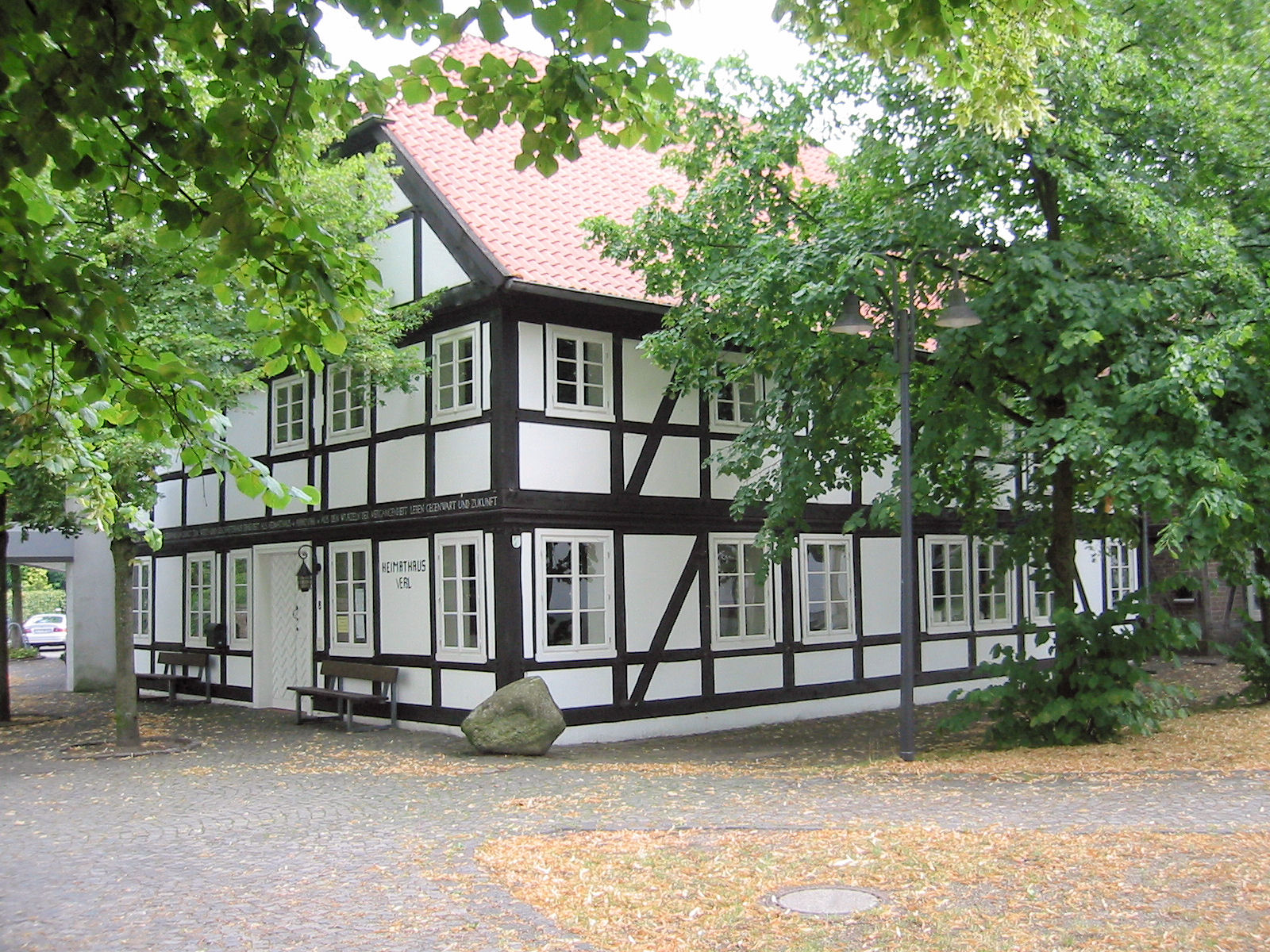 Verl, Heimathaus This is the photograph of an architectural monument. It is part of the list of cultural monuments of Verl, no. 1